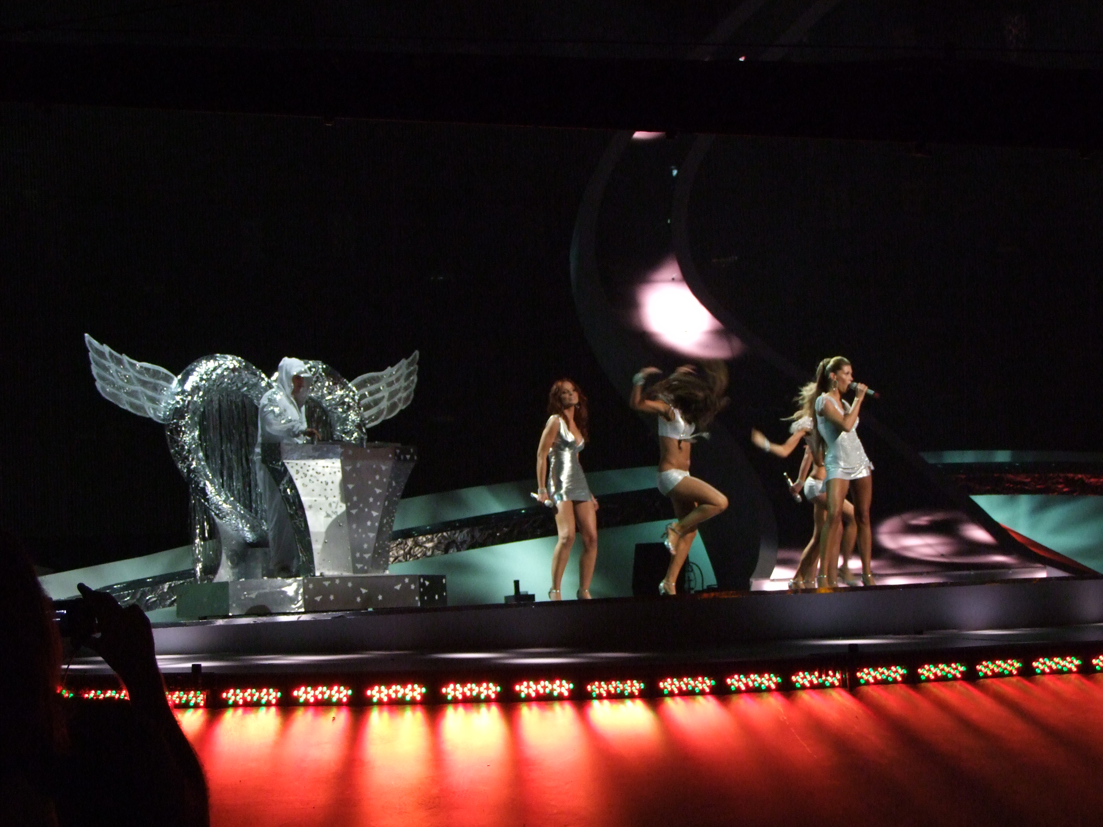 Semifinal 2 Eurovision 2008